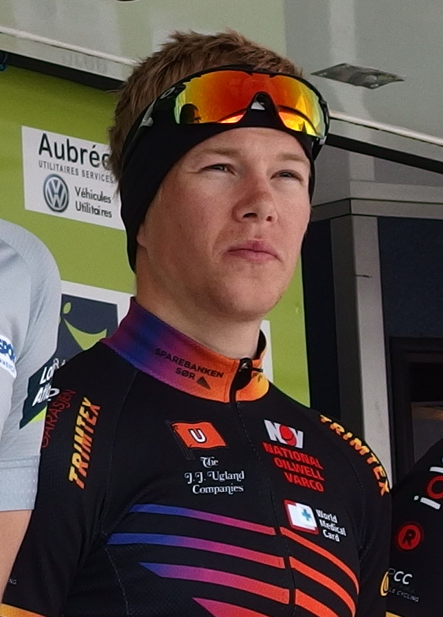 Tour de Bretagne 2014 - Présentation des équipes au départ de la sixième étape à Radenac - Équipe Sparebanken Sør Depicted person: Fridtjof Røinås